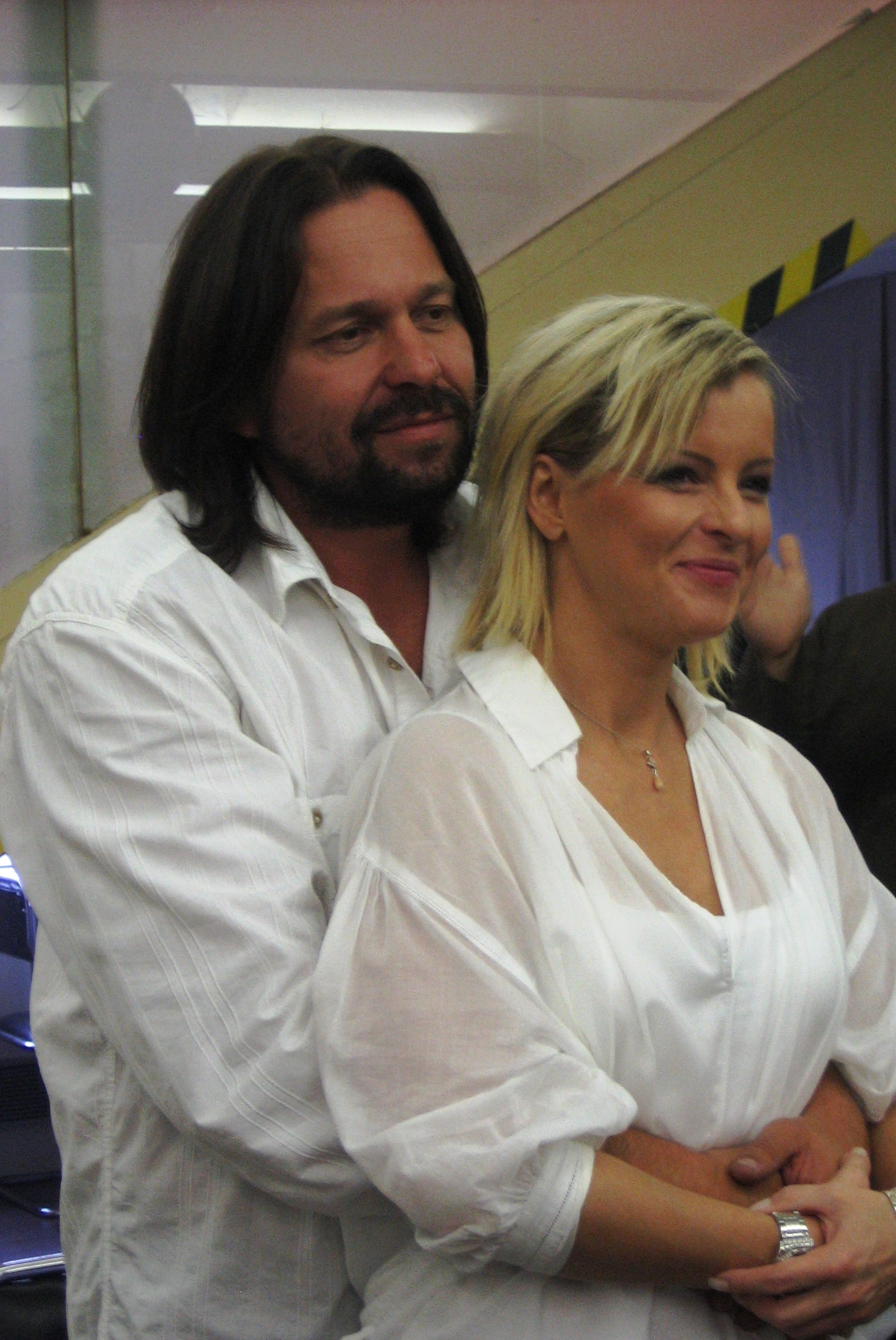 Iveta Bartošová a Jiří Pomeje na setkání Fanklubu IB v pražském Mánesu 2008